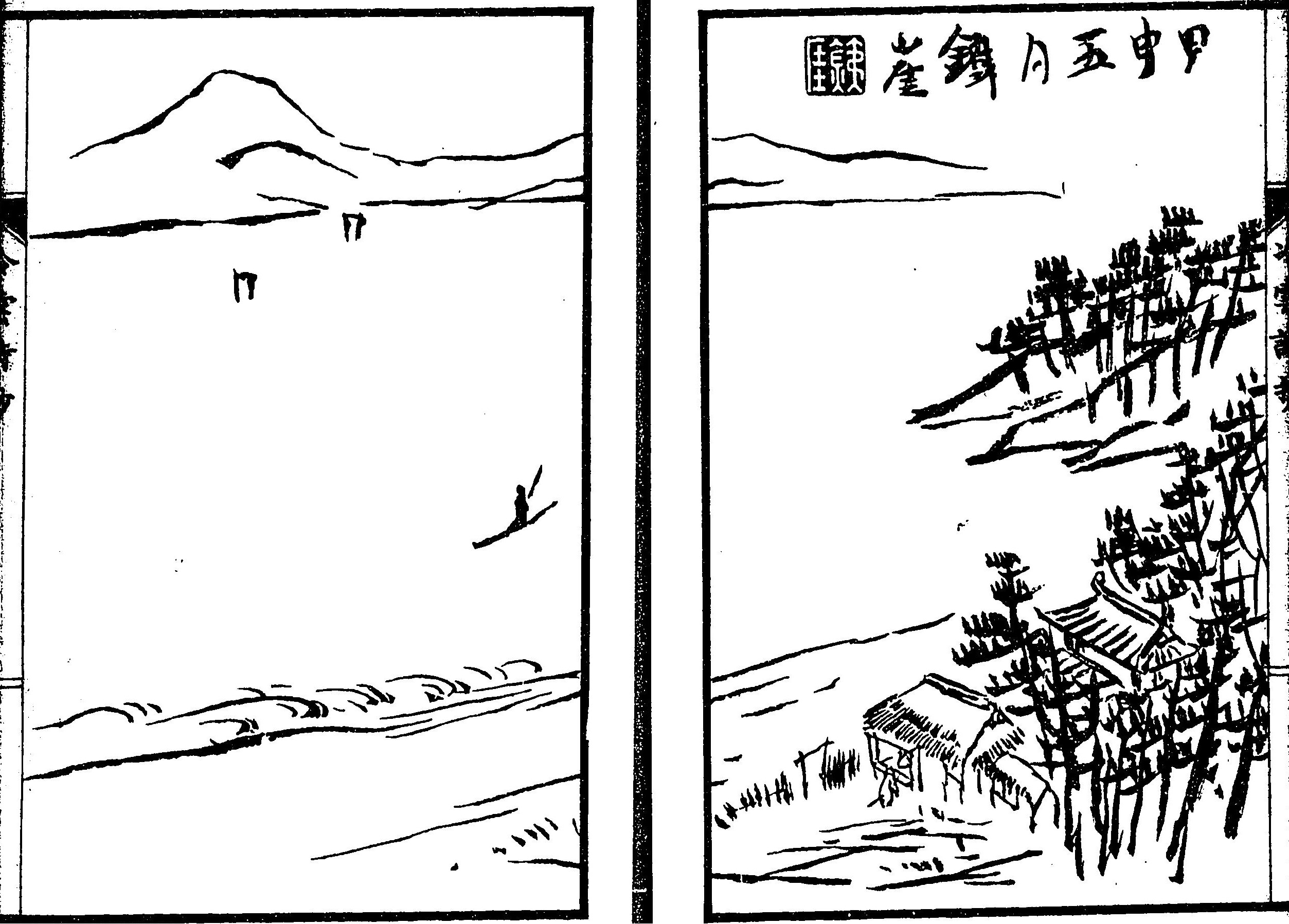 『冷雲詩鈔』巻上「審易窩図」